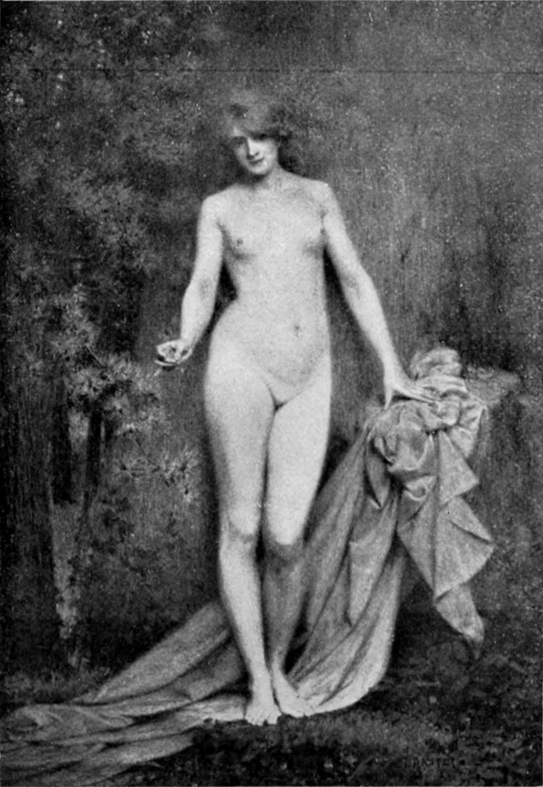 Pervenches